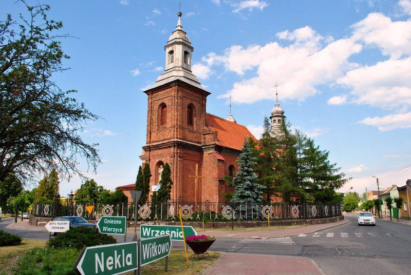 Czerniejewo, pl. Onufrego Kopczyńskiego 7 - kościół parafialny pw. św. Jana Chrzciciela z końca XVI, XVIII w., 1904 r. (zabytek nr 374/A